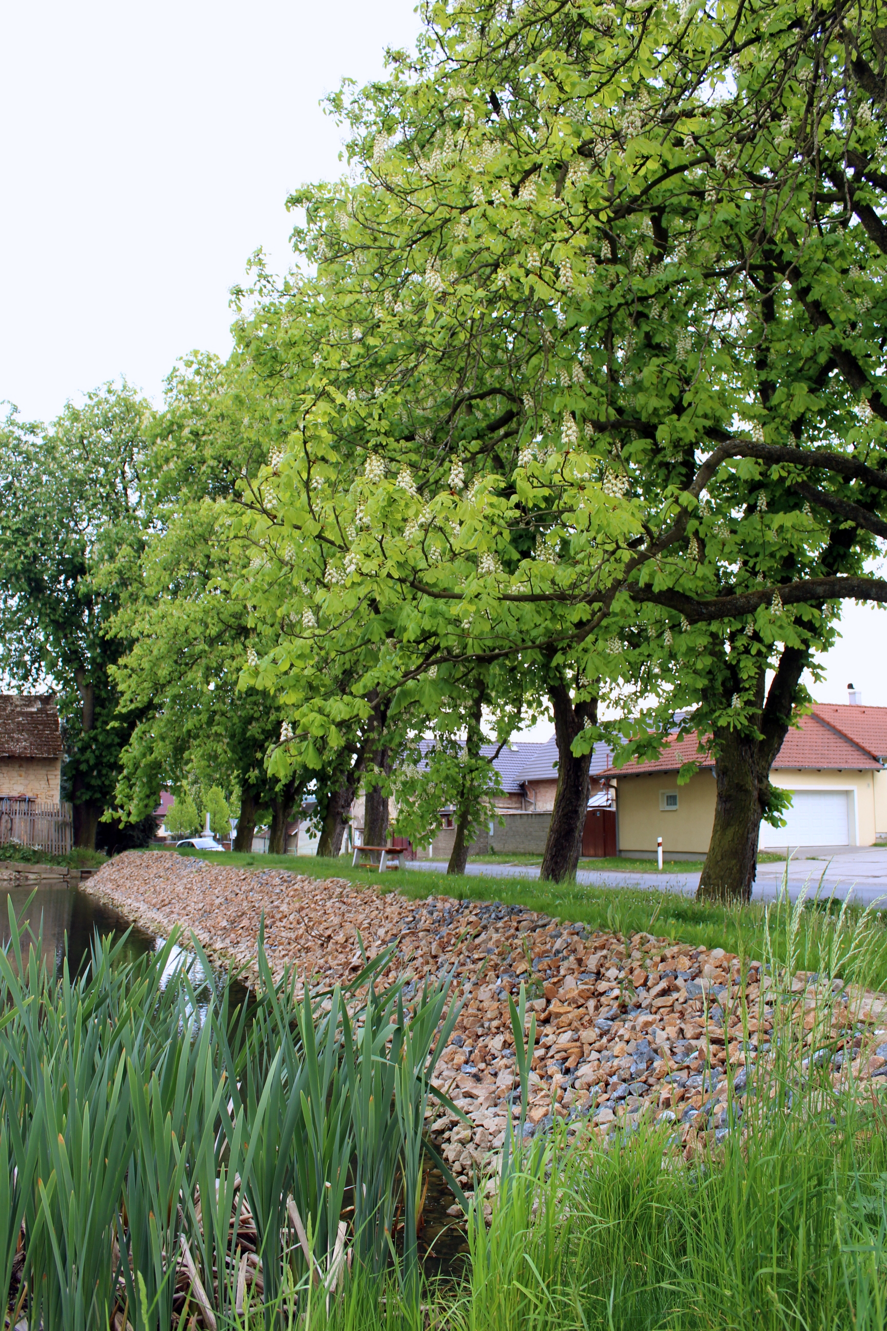 Třtice náves